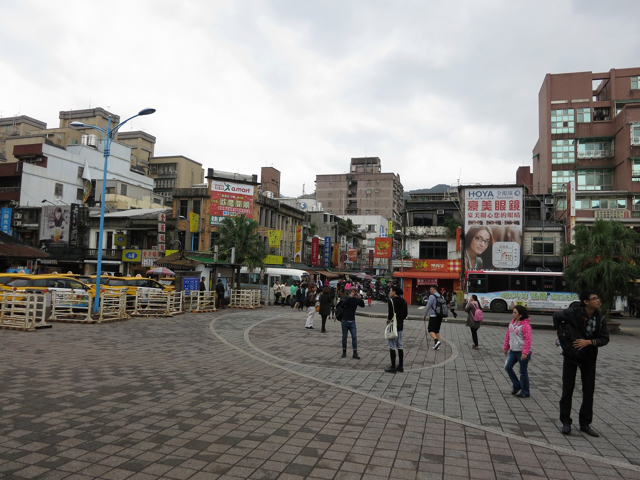 臺灣鐵路管理局瑞芳車站前廣場。